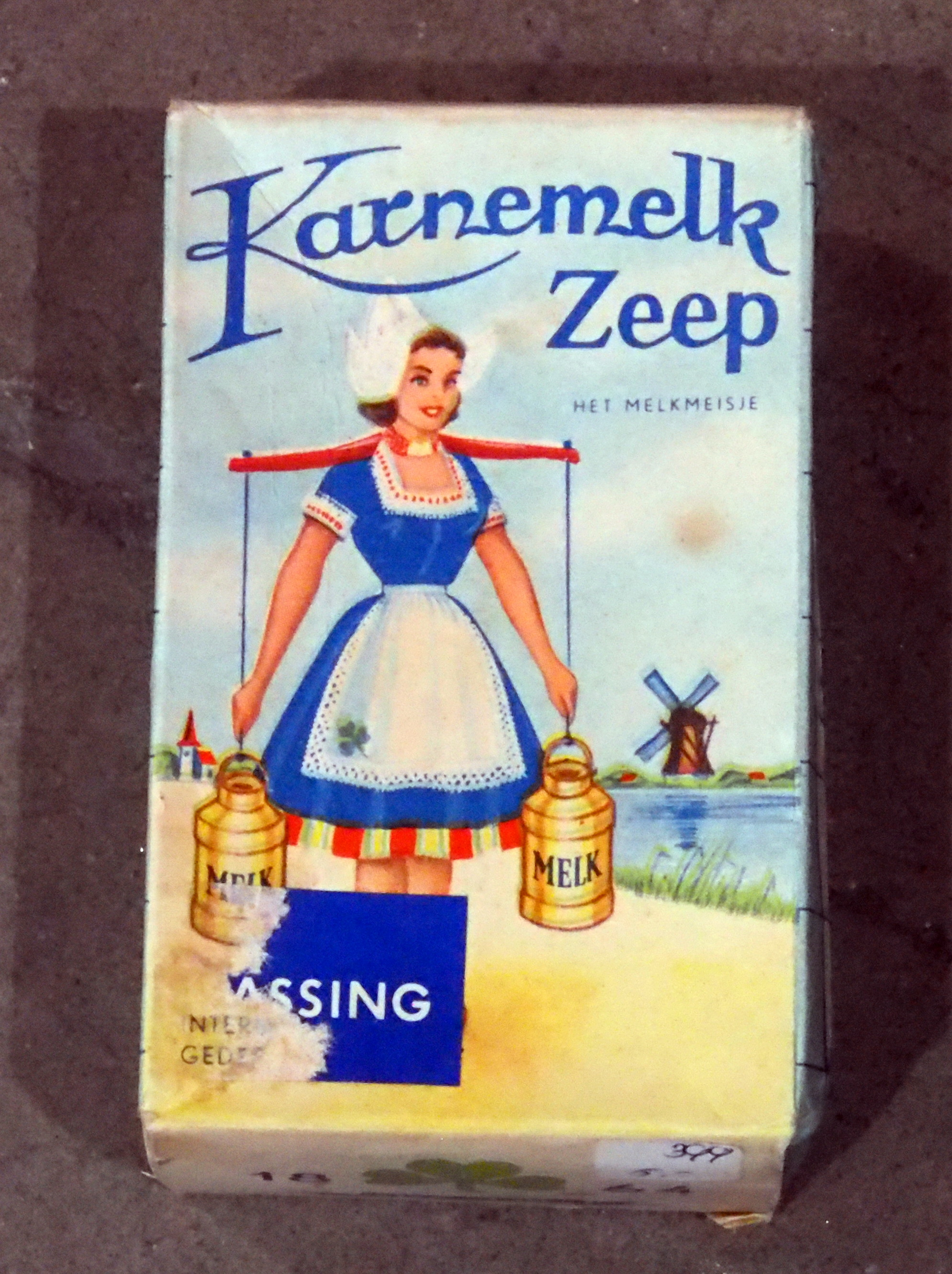 Het Melkmeisje Karnemelk zeep